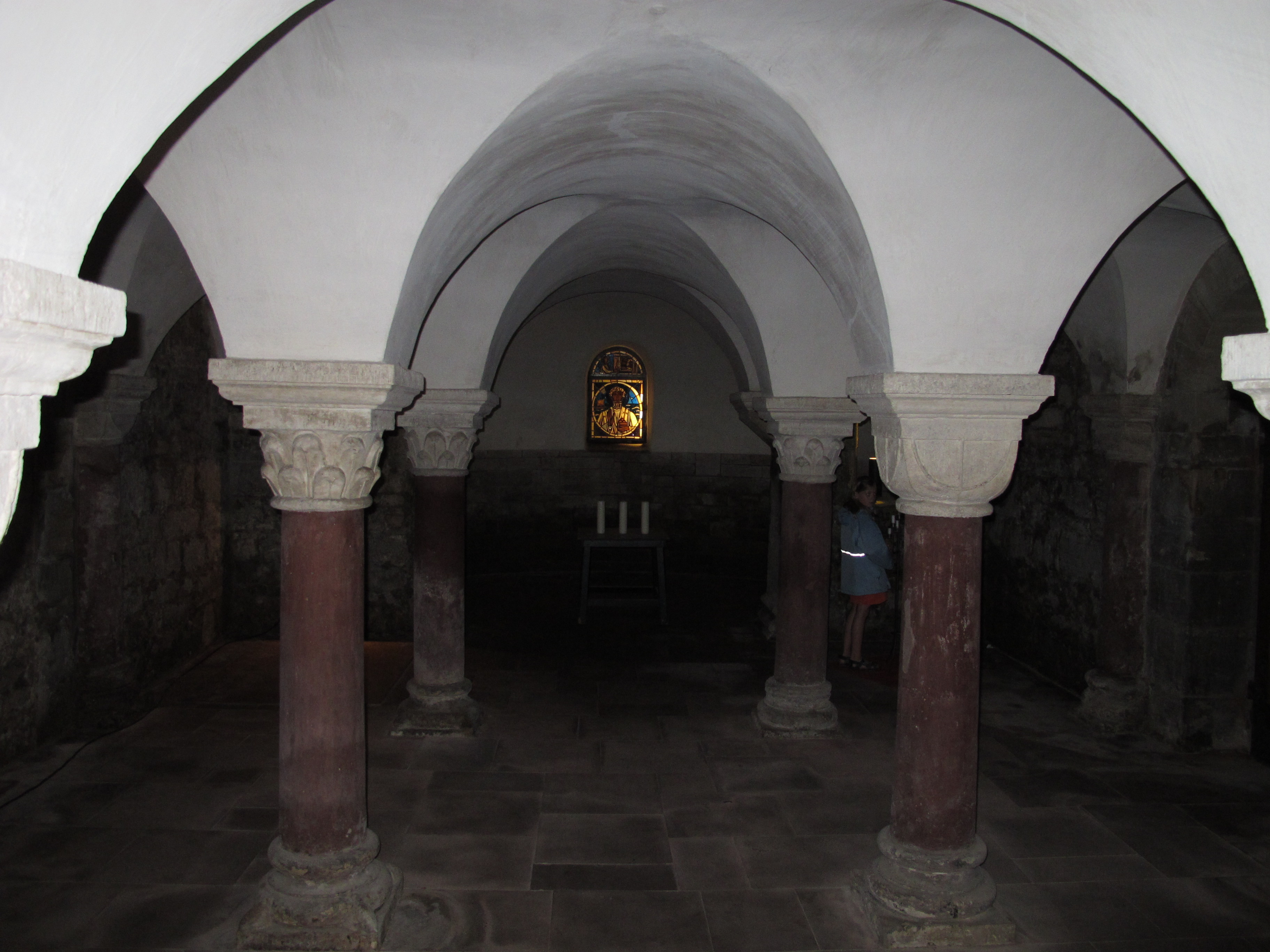 Bad Gandersheim: Stiftskirche, Krypta